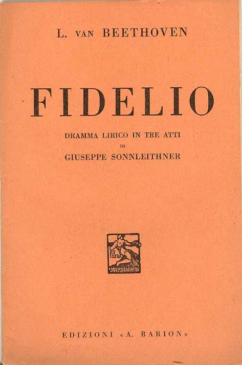 Copertina libretto "Fidelius" dramma lirico in tre atti di Giuseppe Sonnleithner traduzione italiana di A. De Lauziéres musica di Charles Gounod - editore Attilio Barion Sesto San Giovanni - Milano 1940